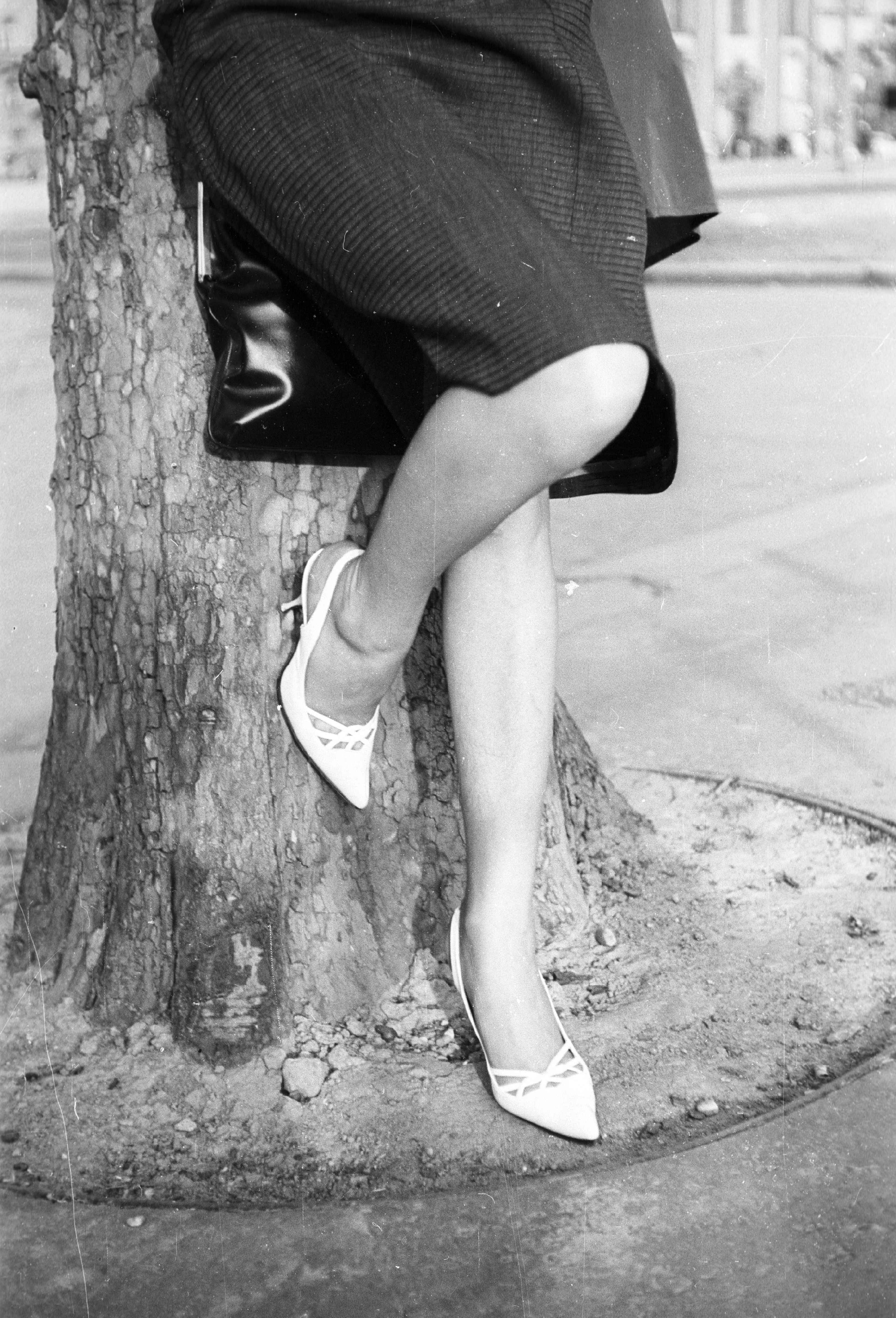 Női divat. Location: Hungary. Tags: fashion, Budapest Title: Női divat, 1967 Budapest.